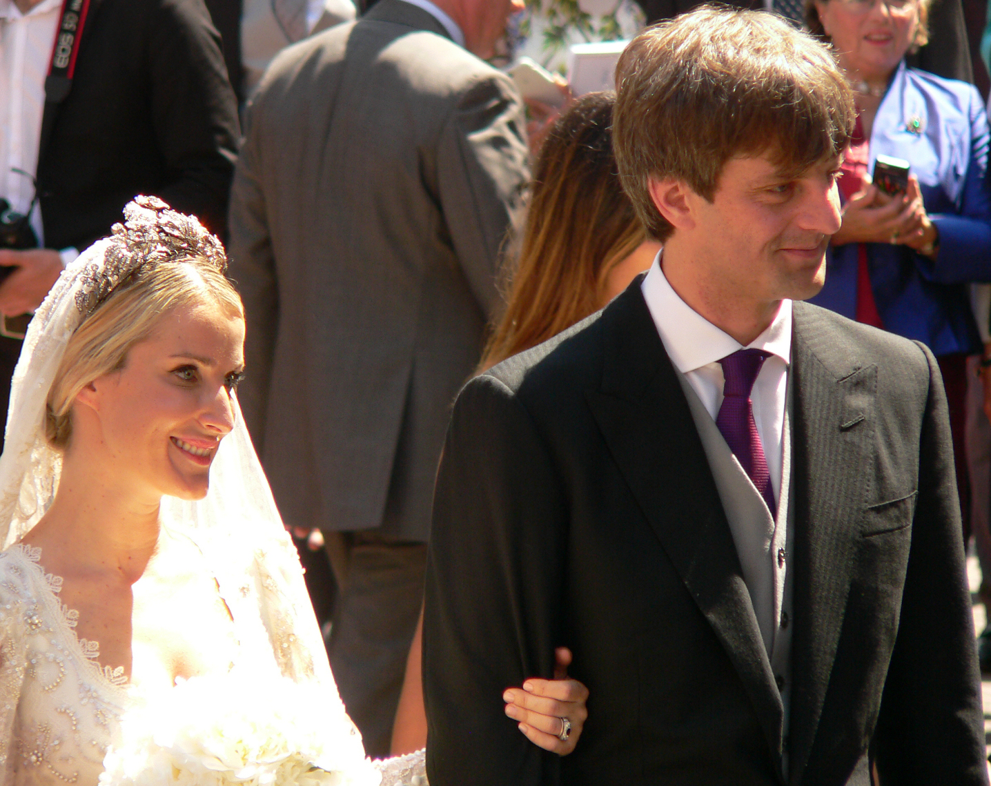 Hochzeitspaar Ekaterina Malysheva und Ernst August von Hannover vor der Marktkirche nach der Trauung